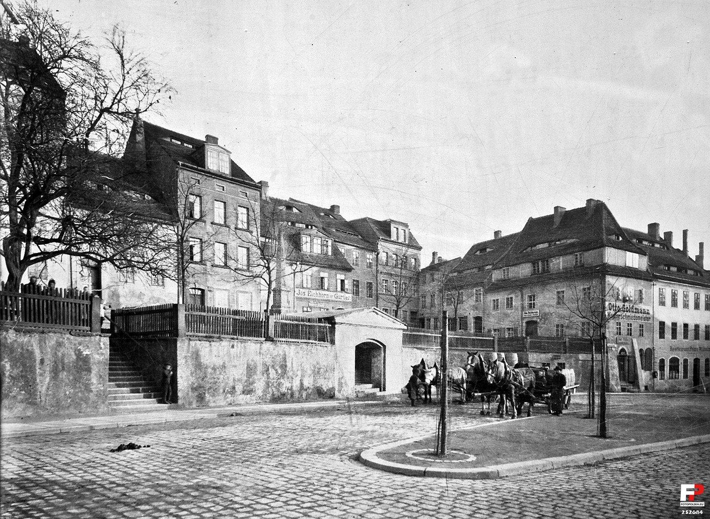 Archiwalny widok Placu Pocztowego.